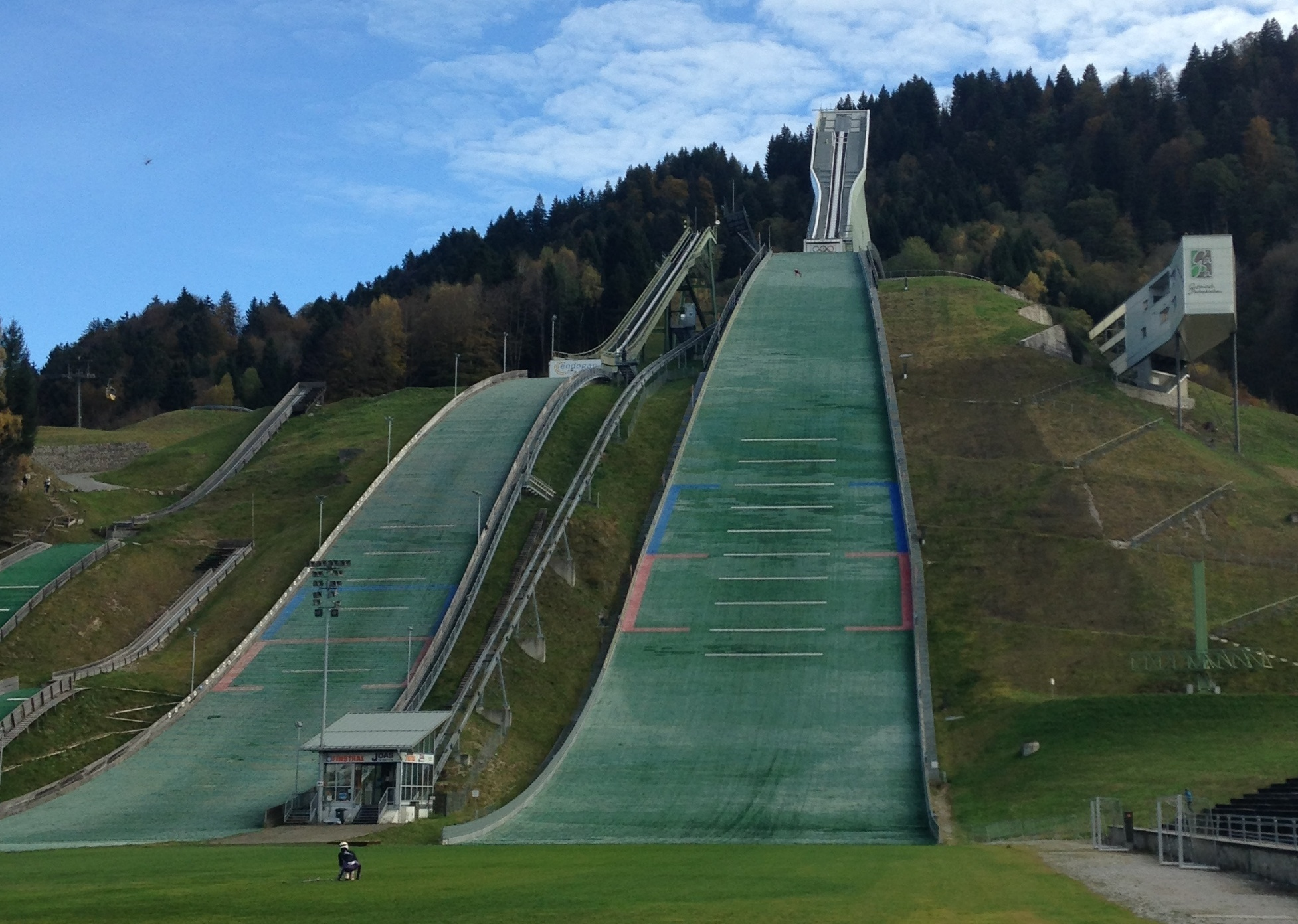 Herbst-Training auf der großen Olympia Skisprung Schanze in Garmisch-Partenkirchen